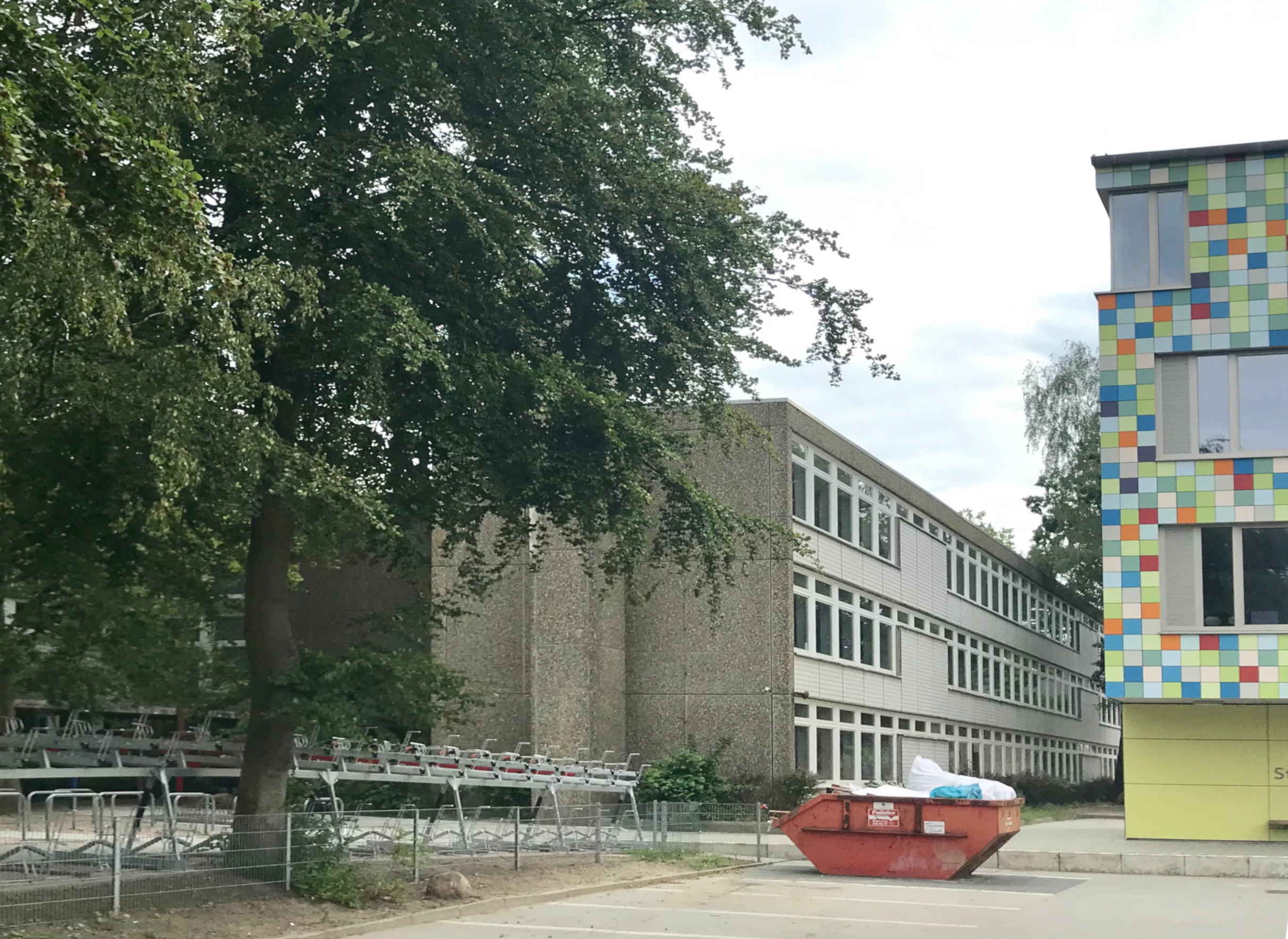 Gymnasium und Stadtteilschule Rissen in Hamburg, links das Doppel-H-Gebäude des Gymnasiums, rechts (angeschnitten) das Hauptgebäude der Stadtteilschule Rissen mit Klassen- und Fachräumen.